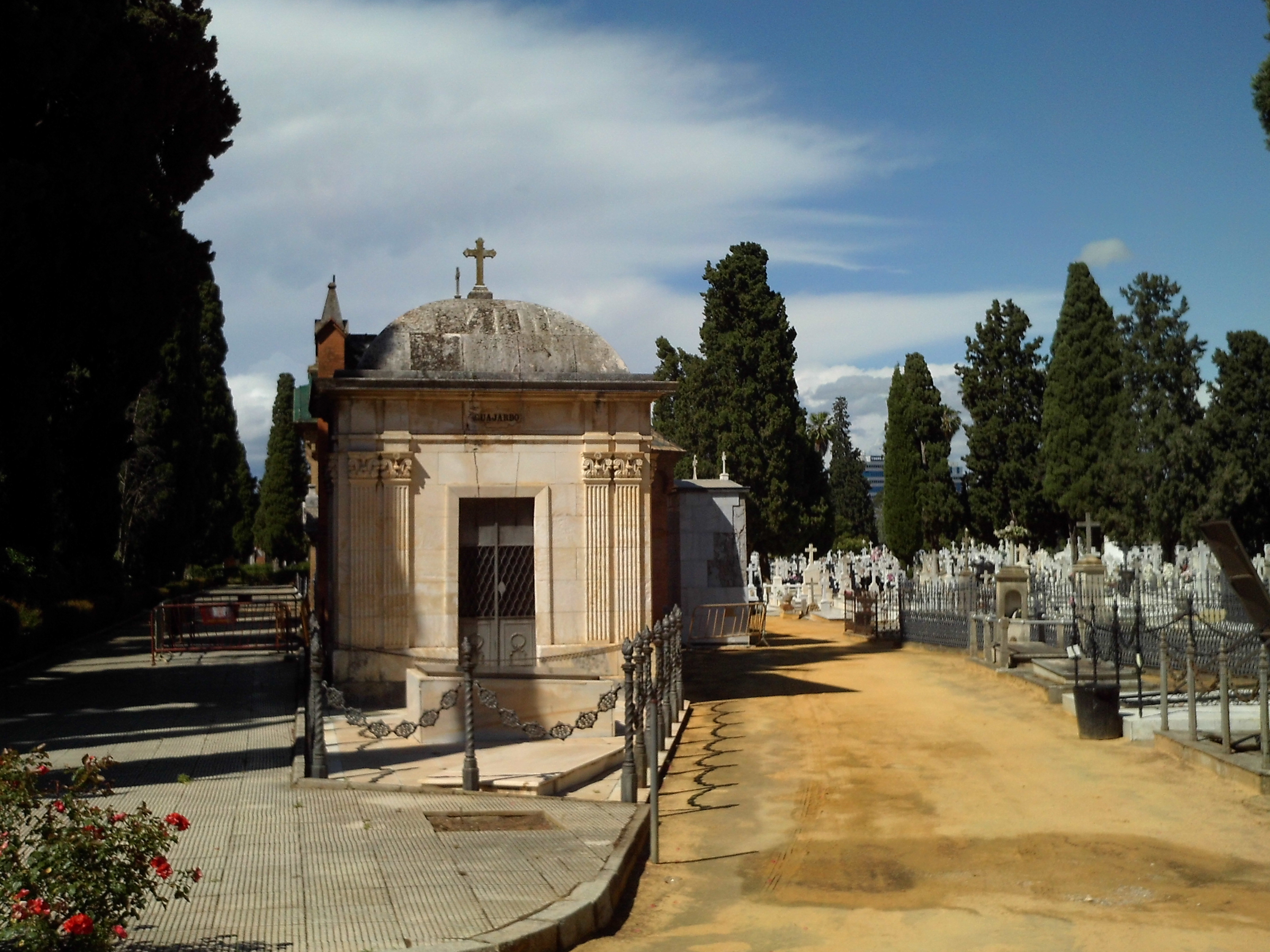 A la izquierda, el panteón de los Riquelme, diseñado en 1888 por Juan Talavera de la Vega. A la derecha, tumbas blancas. Cementerio de San Fernando, Sevilla.